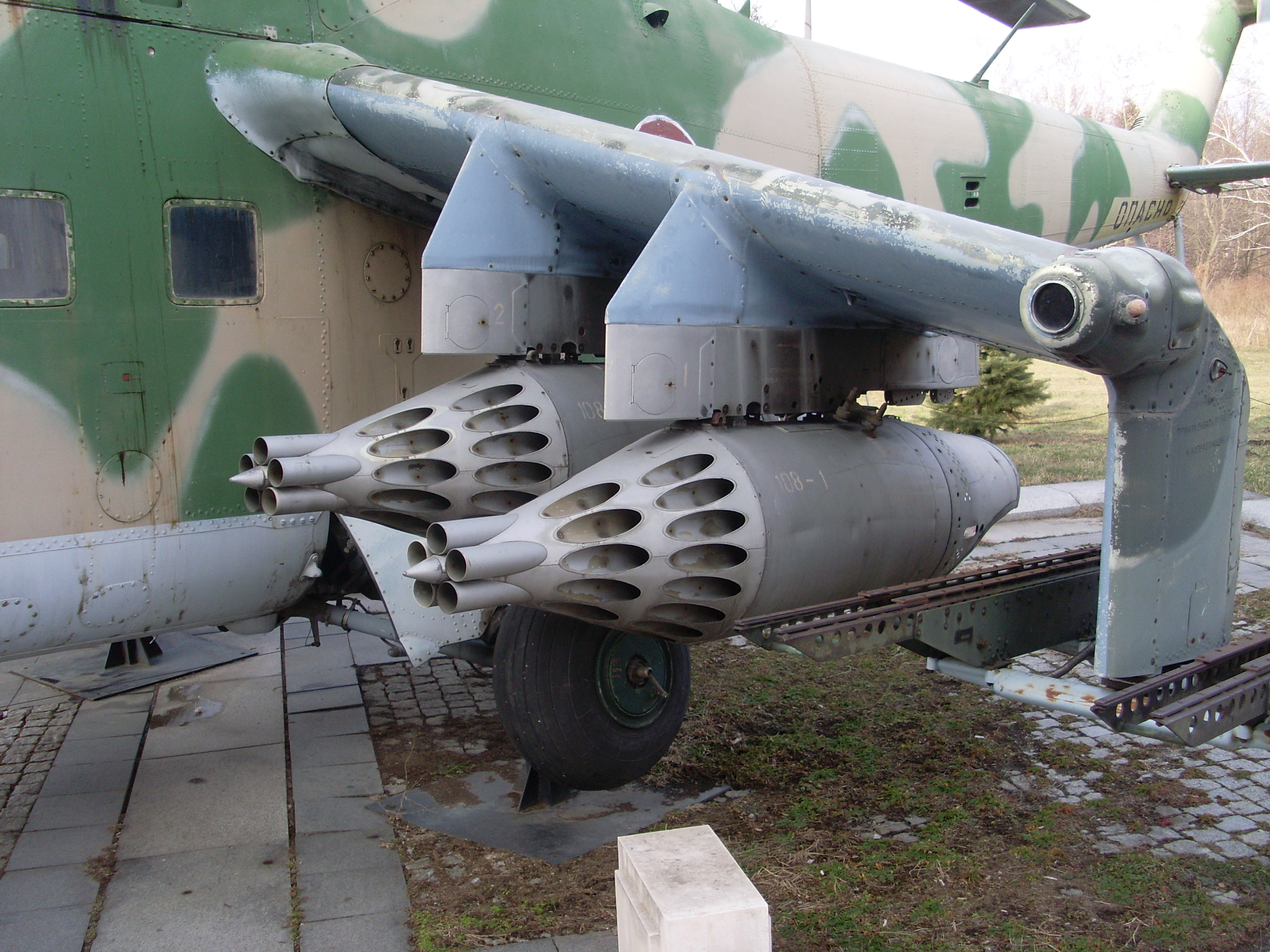 Mil Mi-24, armamento, Museo Nacional de Bulgaria, marzo de 2011